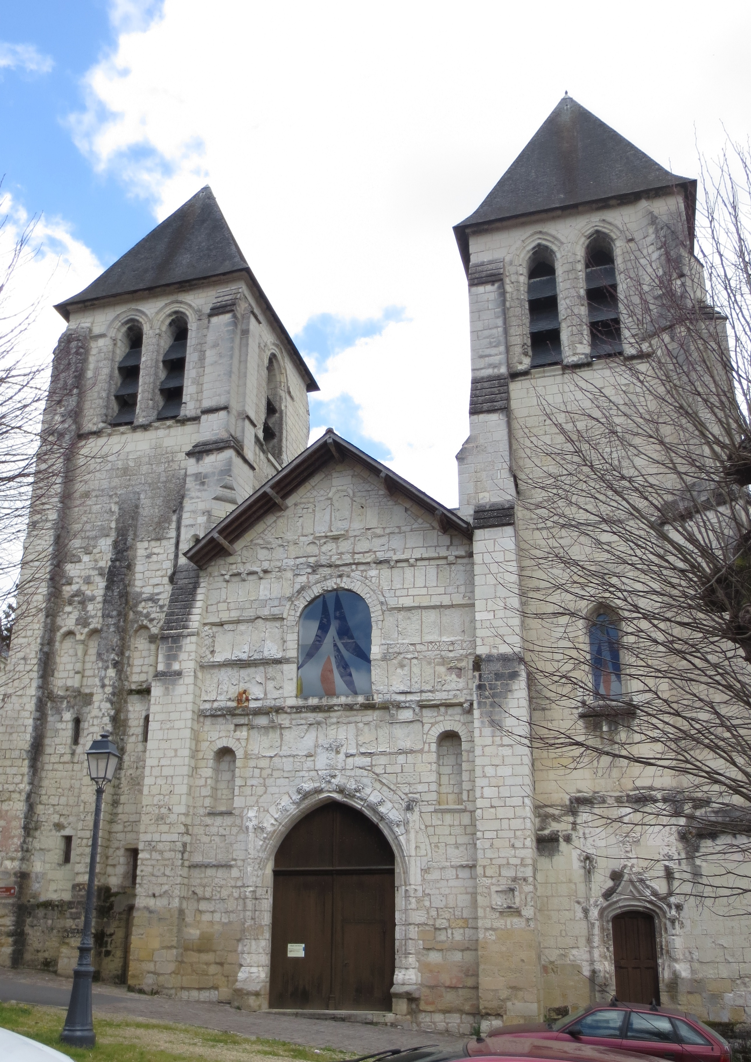 Façade occidentale de la collégiale Saint-Mexme de Chinon